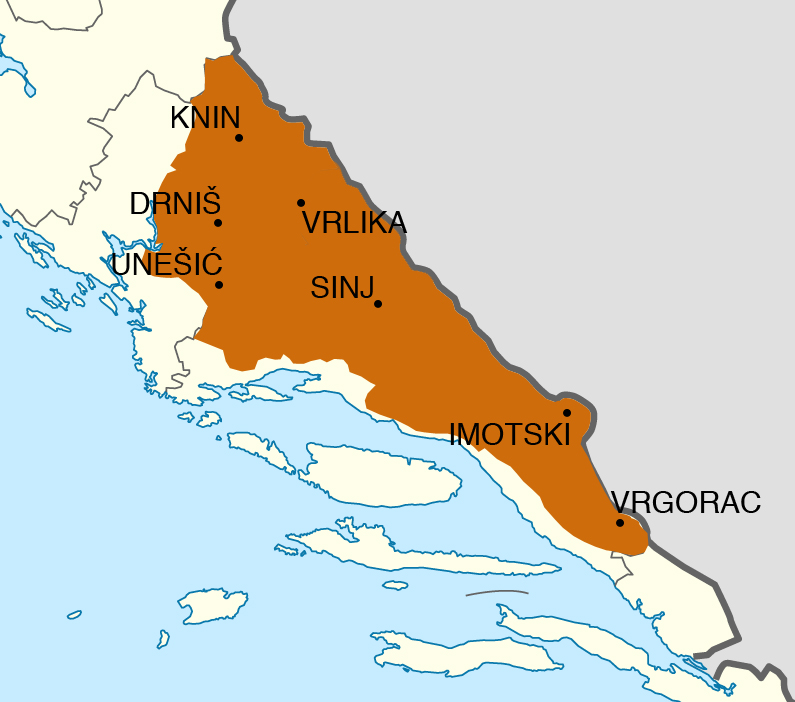 Karta temeljena na radu Mate Matas, Josip Faričić: ZAGORA – UVODNE NAPOMENE I TERMINOLOŠKE ODREDNICE, stranica 48